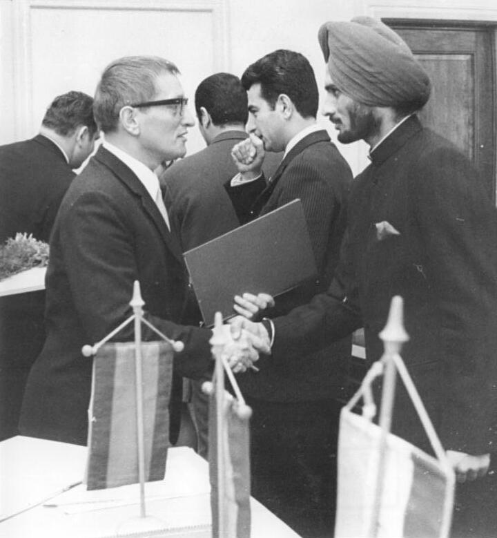 Leipzig, Abschlussfeier eines Trainerlehrgangs an der DHfK Zentralbild Katscherowski 26-11-70 Leipzig: Trainerlehrgang an der DHfK beendet - Der 7. Internationale Trainerlehrgang fand am 26.11.70 seinen feierlichen Abschluß. Nach achtmonatigen Kurs nahmen 84 ausländische Sportler aus 12 Ländern Afrikas und Asiens Trainerdiplome entgegen. Mit Auszeichnung absolvierten Gardip Singh (Indien, rechts). Der amtierende Rektor der DHfK, Prof. Dr. Paul Kunath (links), überreiche die Diplome.